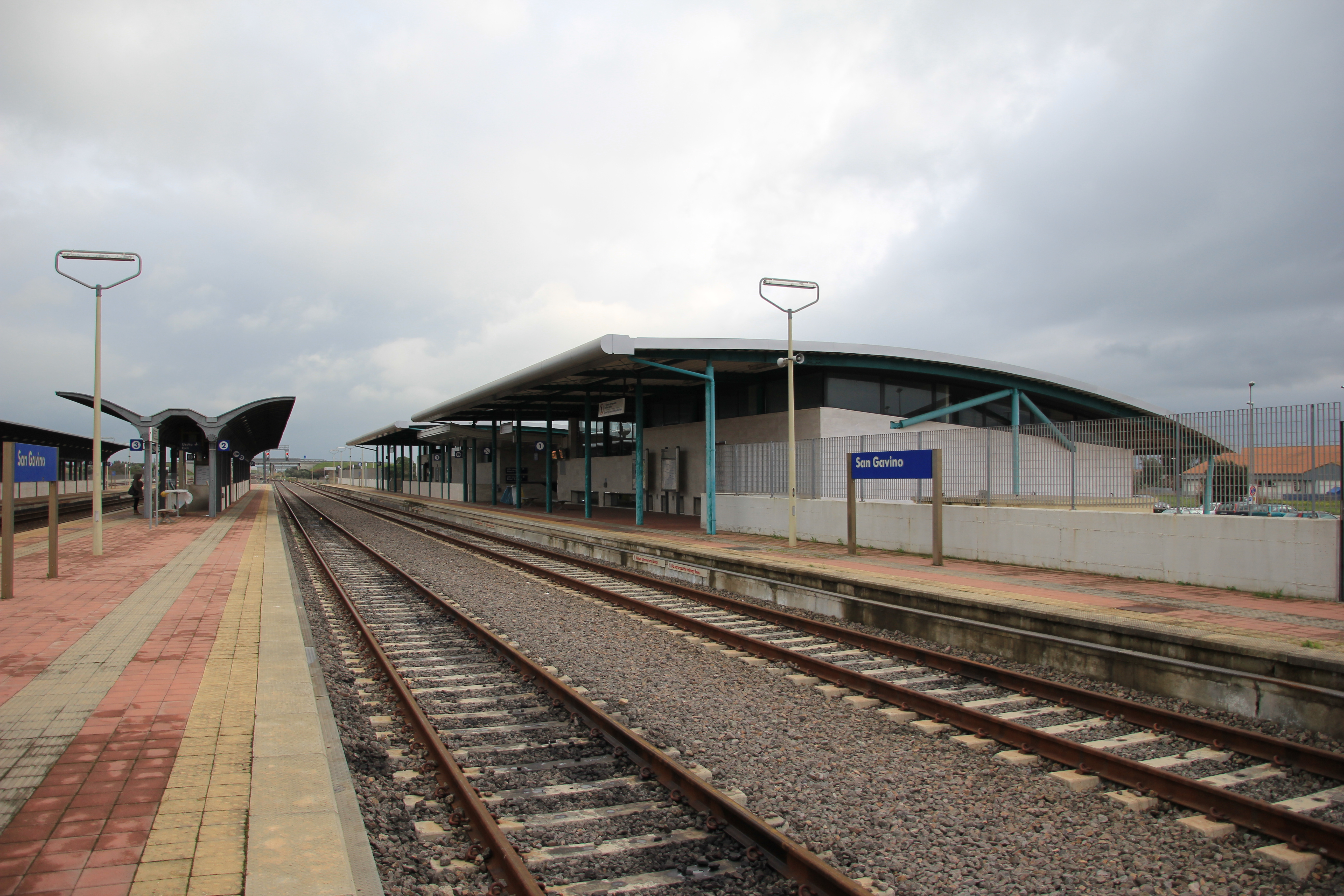 San Gavino Monreale - Stazione ferroviaria